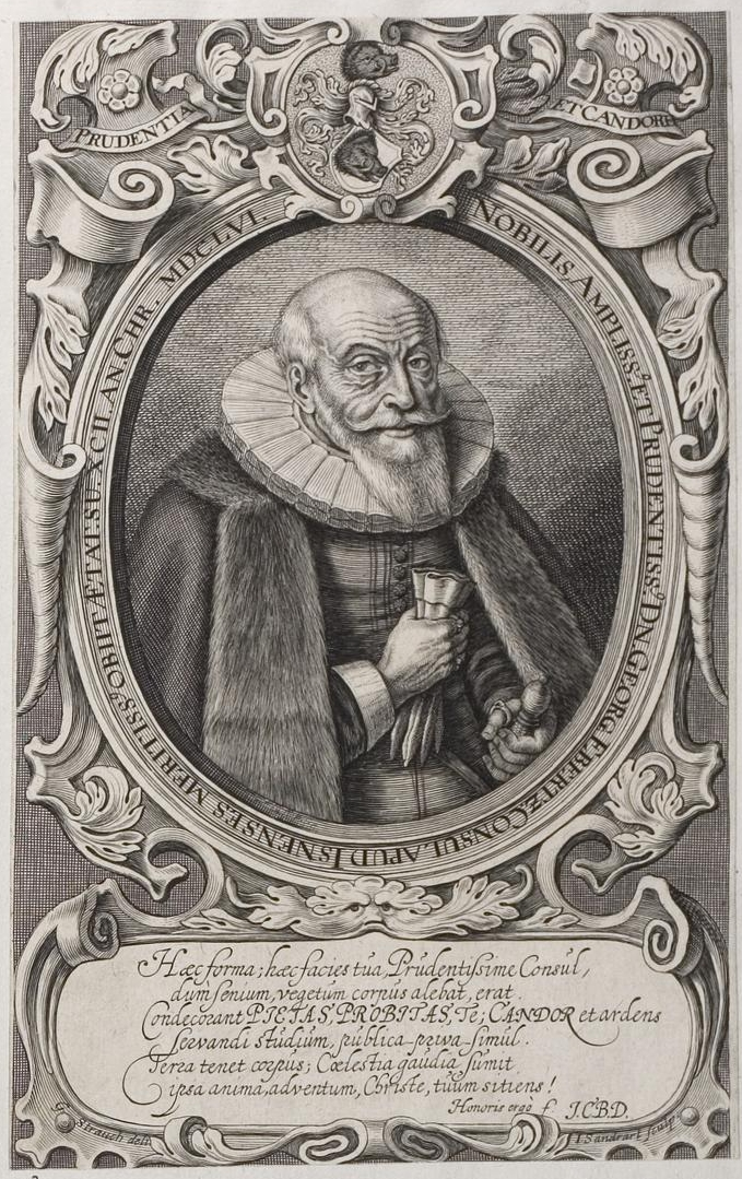 Grafik aus dem Klebeband Nr. 3 der Fürstlich Waldeckschen Hofbibliothek Arolsen Motiv: Georg Ebertz (1565–1656), Bürgermeister der Reichsstadt Isny im Allgäu